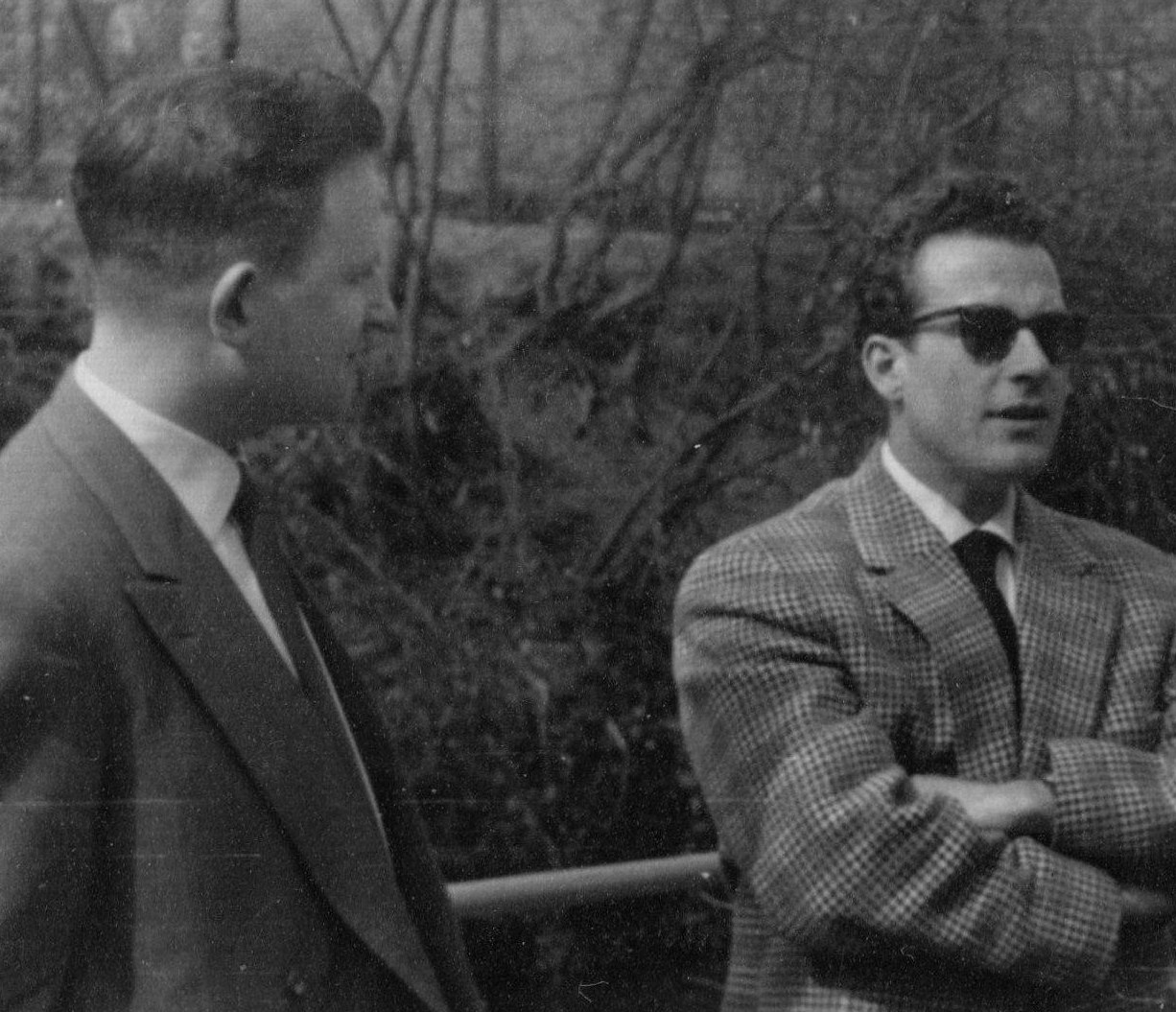 Die beiden Deutschen Jugendmeister im Schach: Heinz Marcus (1948) und Egon Joppen (1943) bei der Hessenmeisterschaft 1956 in Bad Kreuznach.